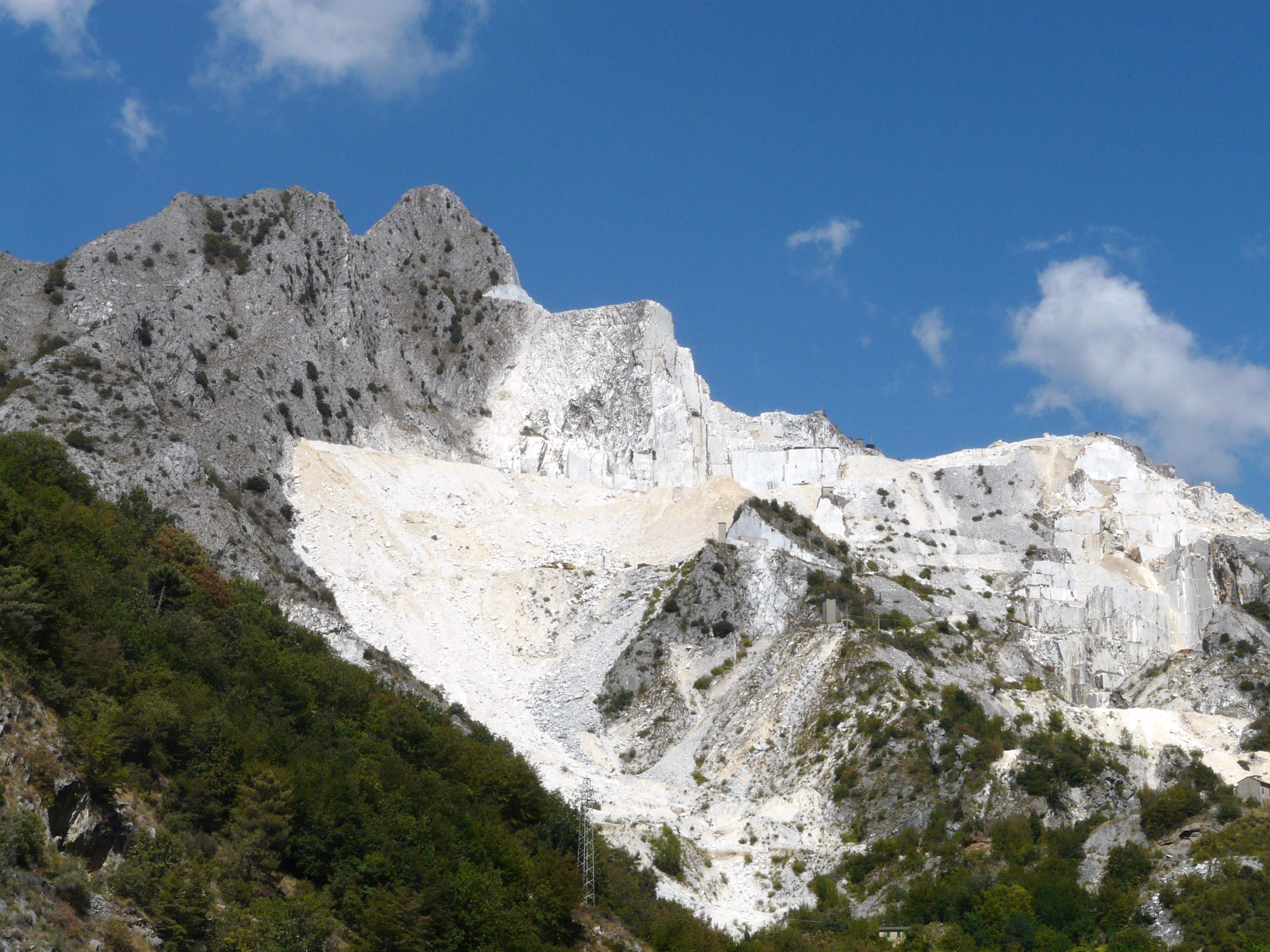 Panorama delle cave di marmo, Carrara, Toscana, Italia